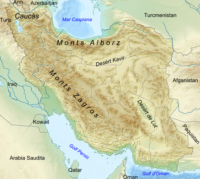 Geografia fisica d'Iran.